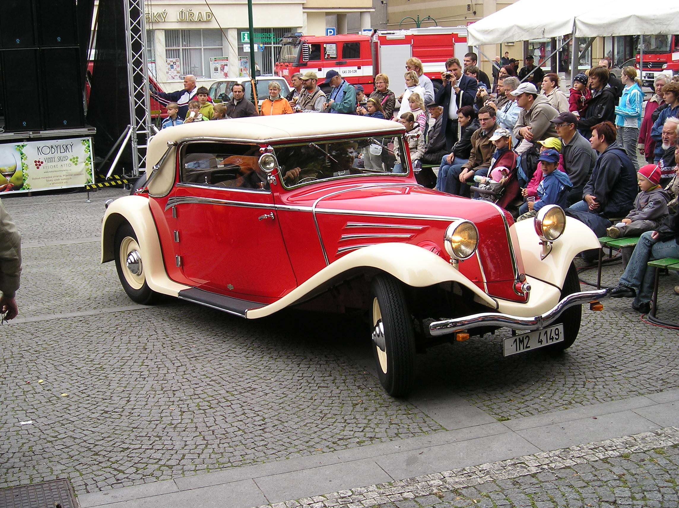 Tatra 52 with Sodomka bodywork